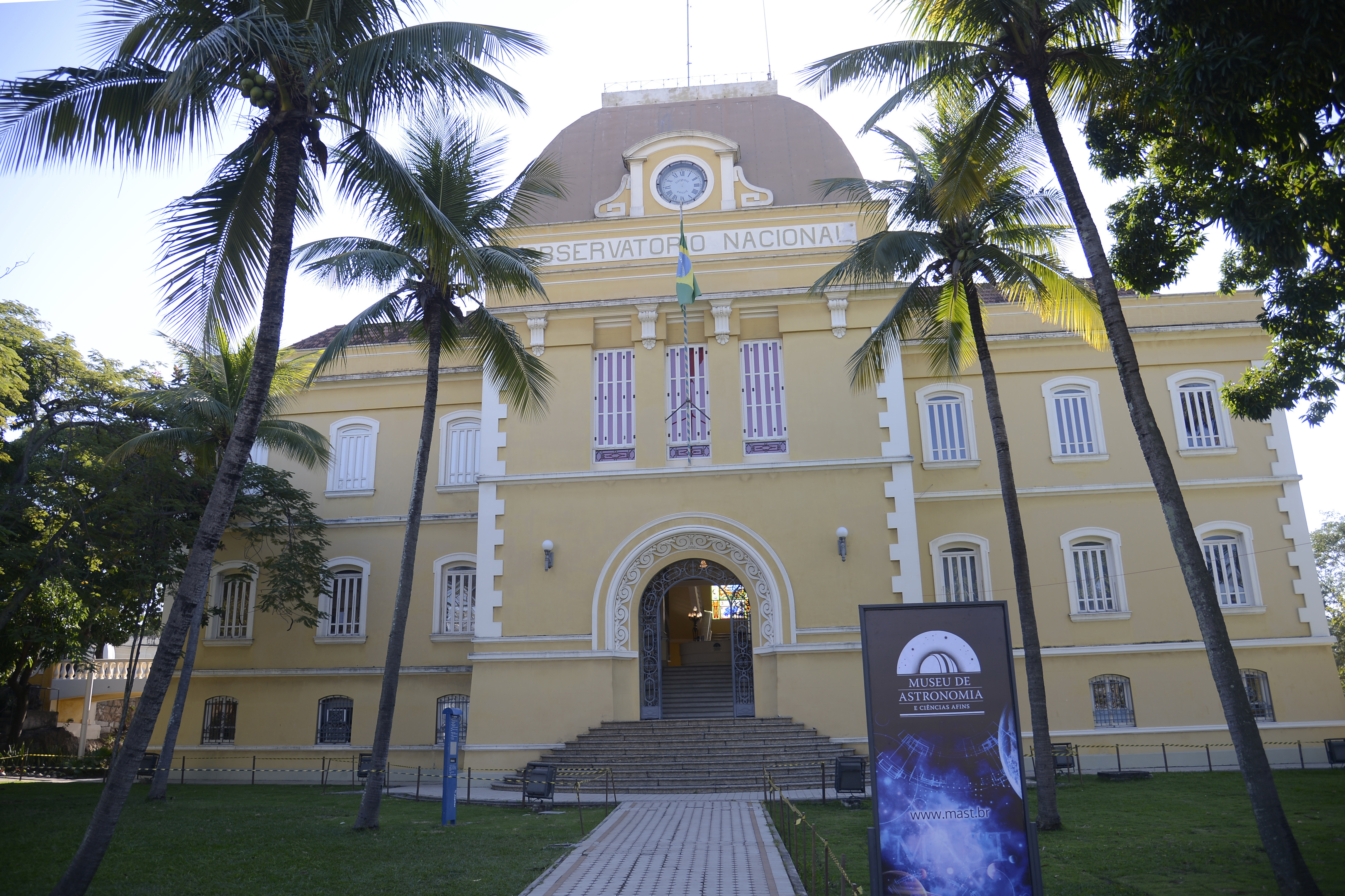 Rio de Janeiro - Exposição no Museu da Astronomia e Ciências e Afins, em São Cristóvão, apresenta peças impressas em 3D e relava como a tecnologia inspira o futuro do design e de outros setores, como a medicina e a indústria.(Foto: Tomaz Silva/Agência Brasil)